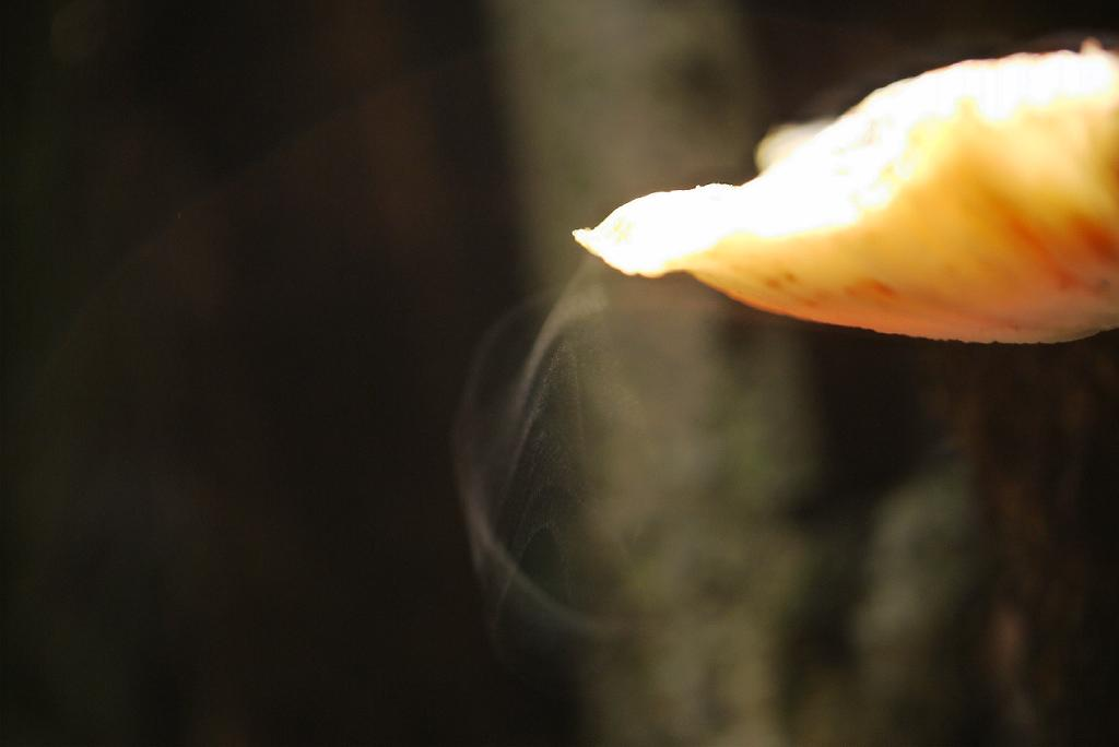 Lentinula edodes:シイタケ：胞子散布の様子 2011/10/16 和歌山県田辺市野外栽培場にて:Tanabe City Wakayama Pref. Japan